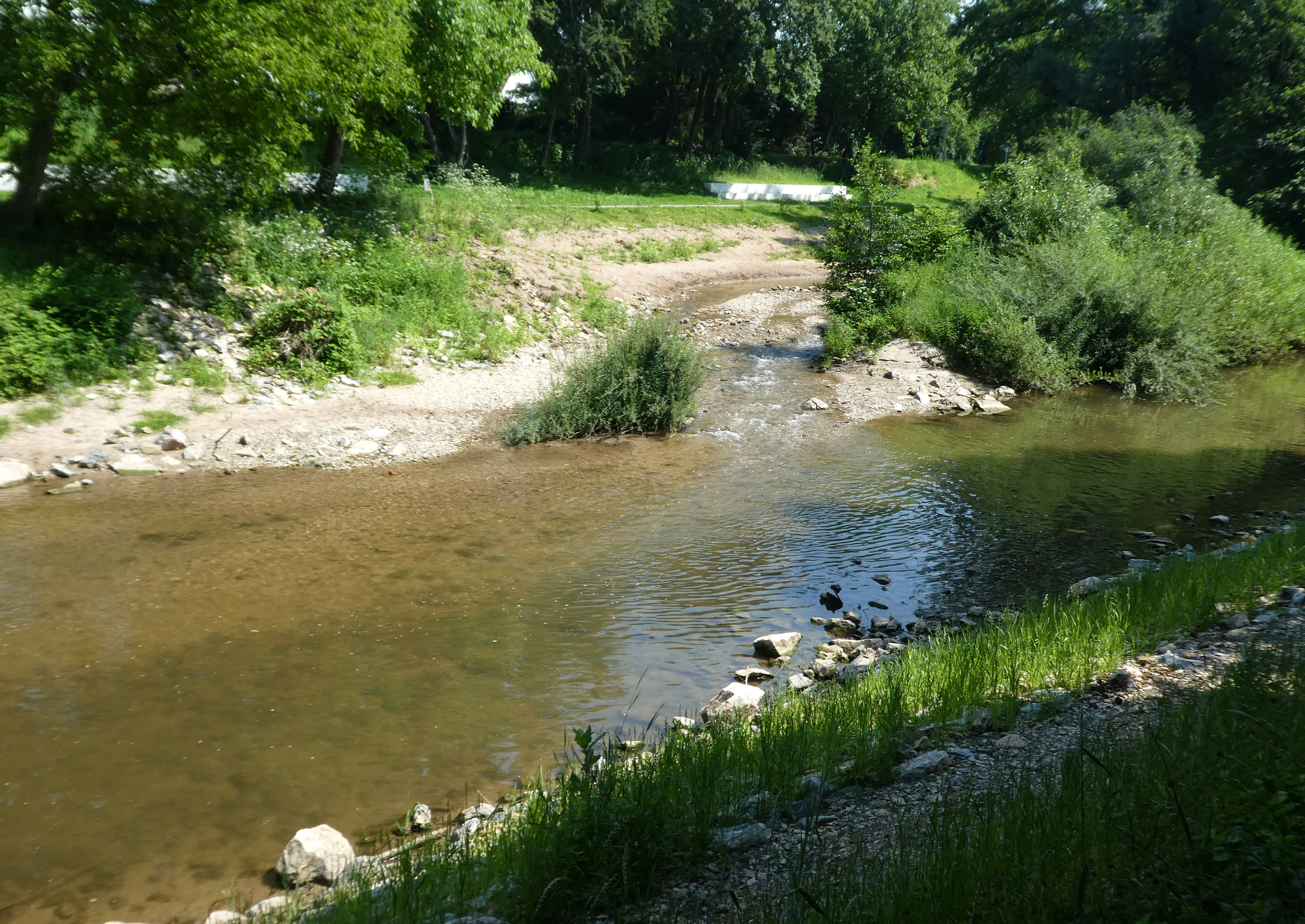 Schorndorf - Untere Mündung der Wieslauf in die Rems. Im Rahmen einer Renaturierung zur Remstal-Gartenschau 2019 entstand ein kleinerer Nebenarm, der etwa fünfzig Meter oberhalb in die Rems mündet.